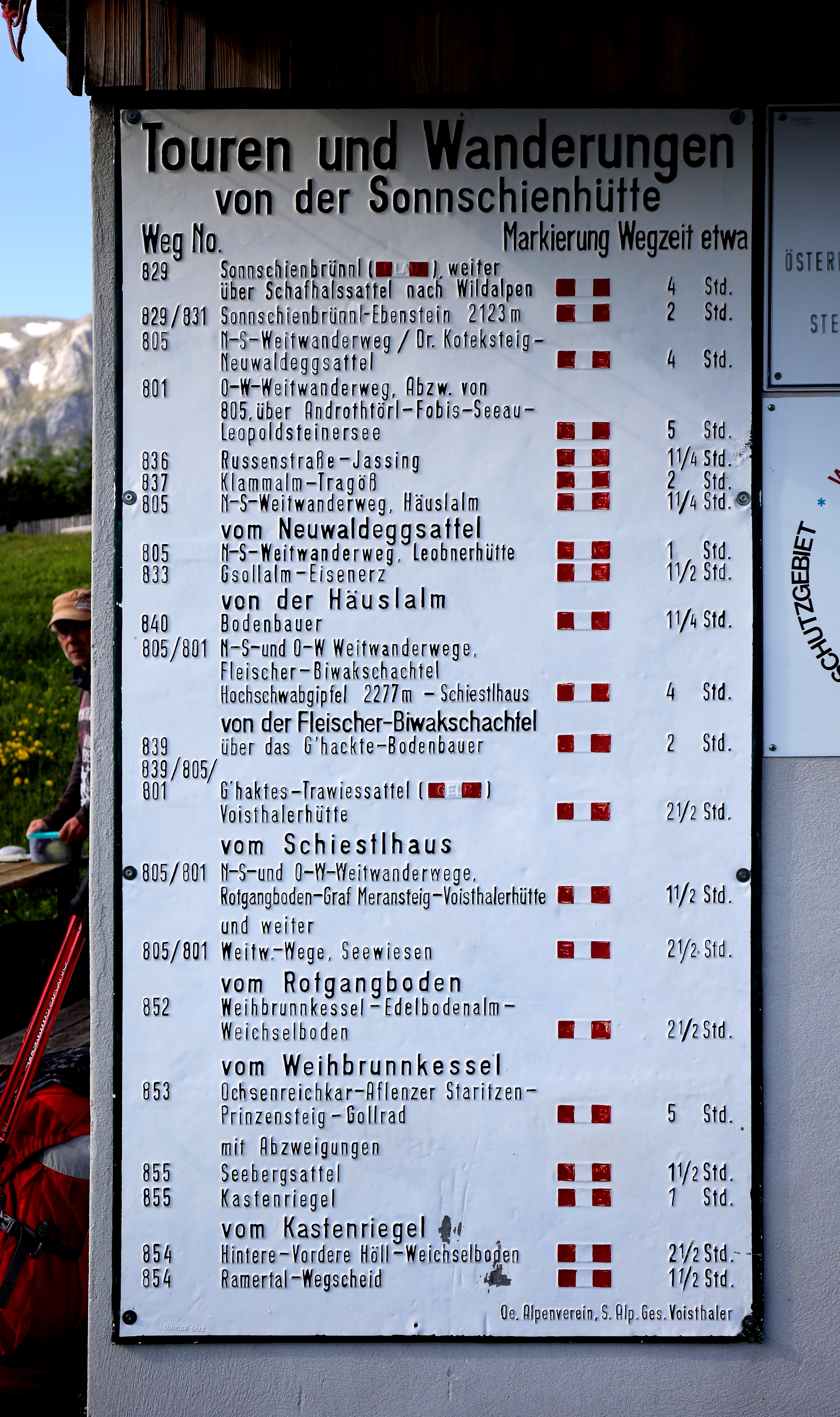 Infotafel bei der Sonnschienhütte südöstlich des Ebensteins auf dem Hochschwabmassiv der Nördlichen Kalkalpen in der Steiermark.